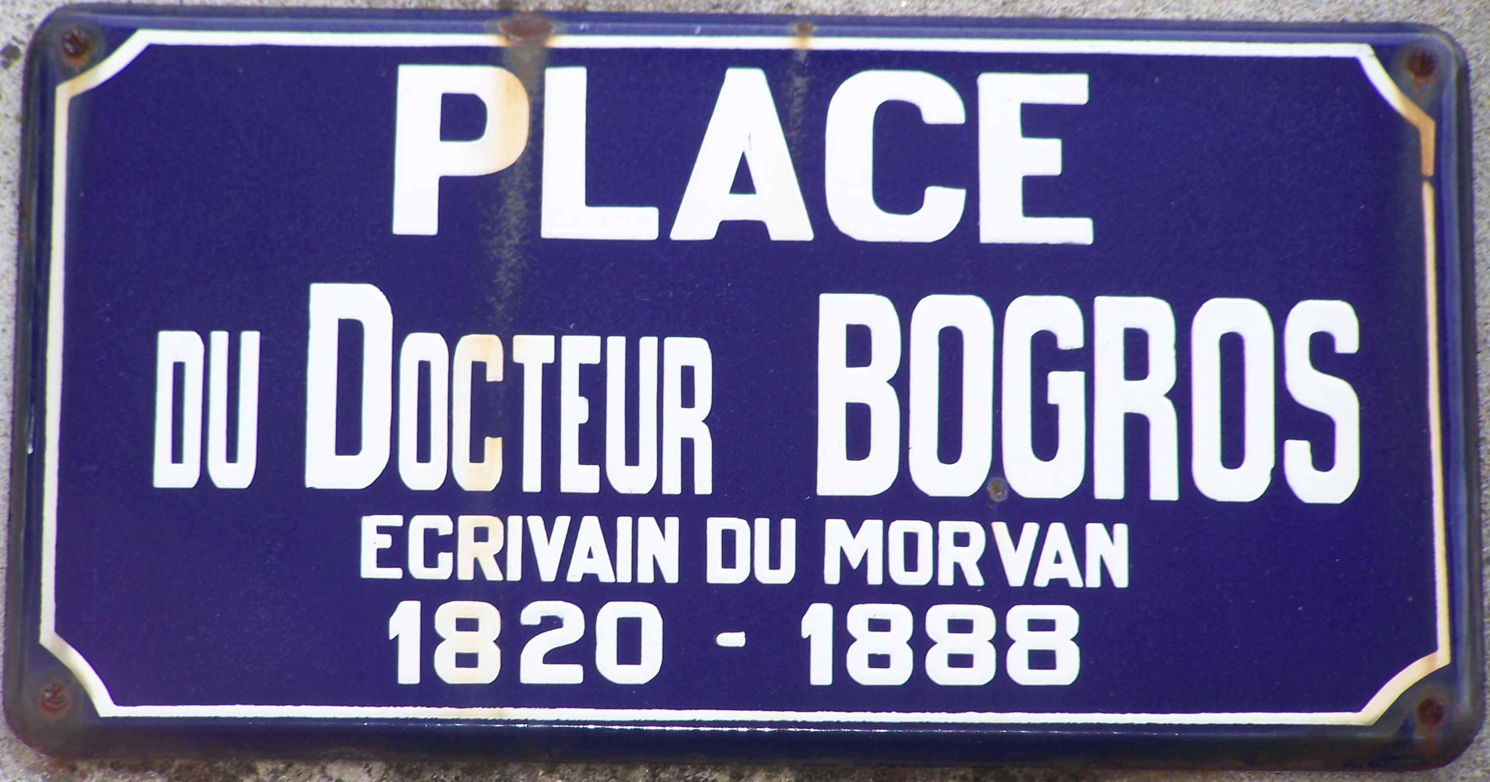 Plaque de la petite place du Docteur Edmond Bogros située dans la partie haute de la ville de Château-Chinon (Ville).